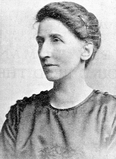 Sufragista y política socialista, luchó por el derecho al voto y la igualdad entre hombres y mujeres.